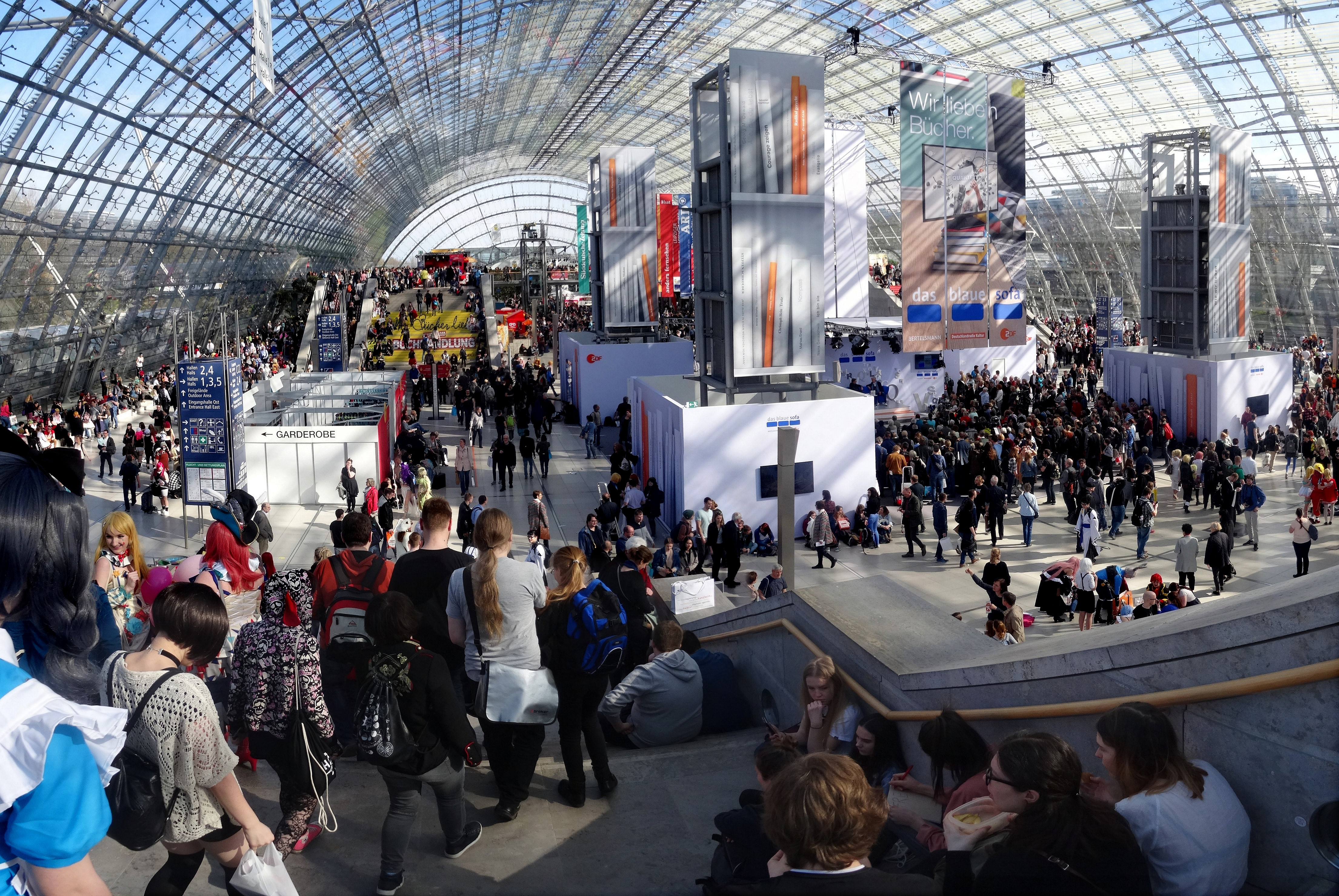 Besucheransturm in der Glashalle während der Buchmesse 2017